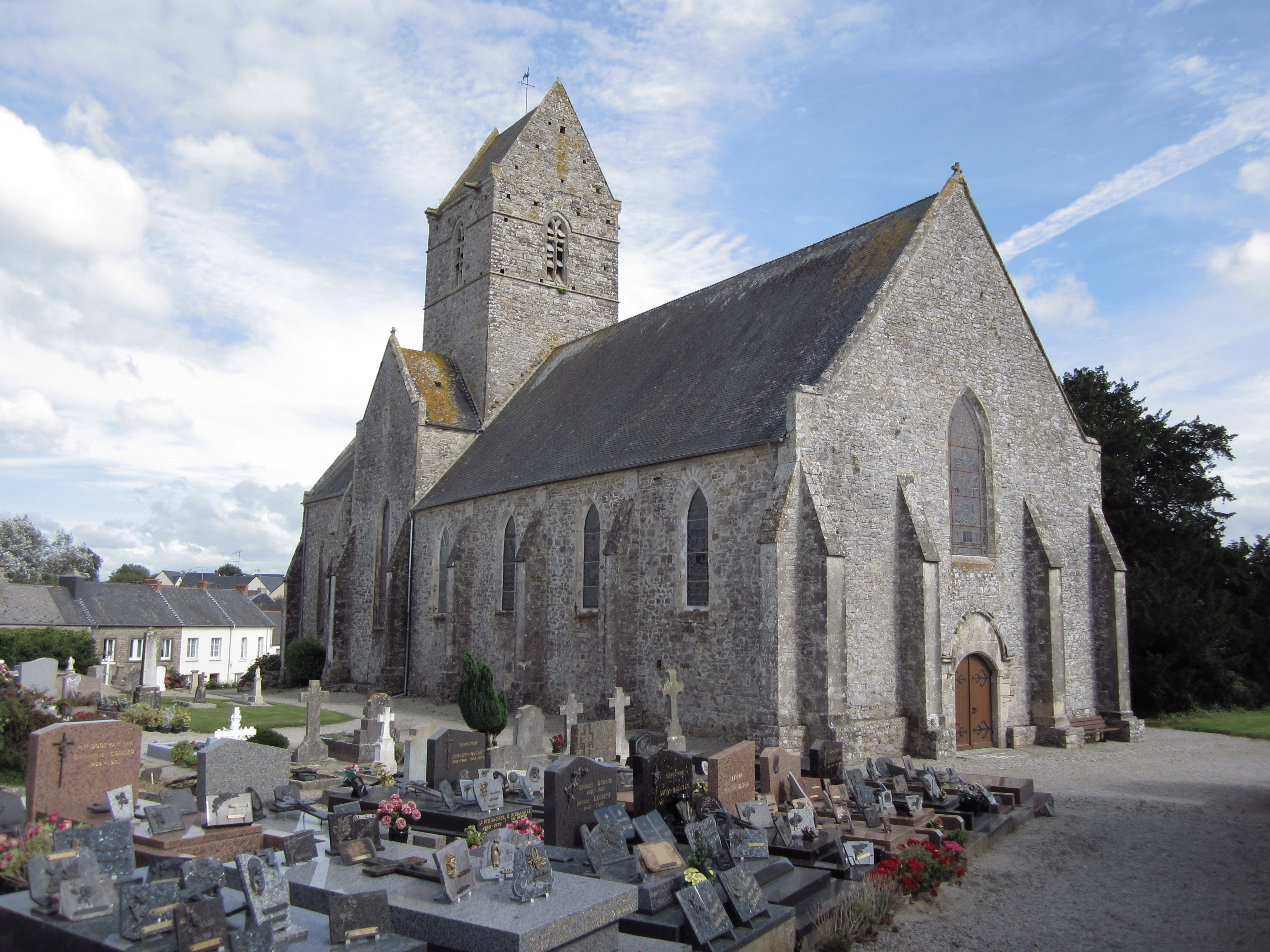 Église Saint-Florent de Besneville